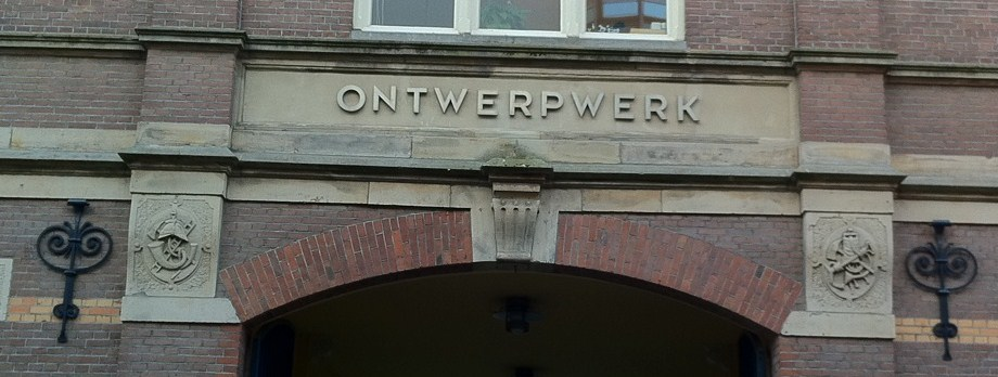 Prinsestraat 37, Den Haag, voormalige brandweerkazerne